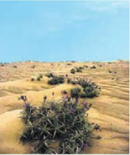 Tillandsias en el desierto.